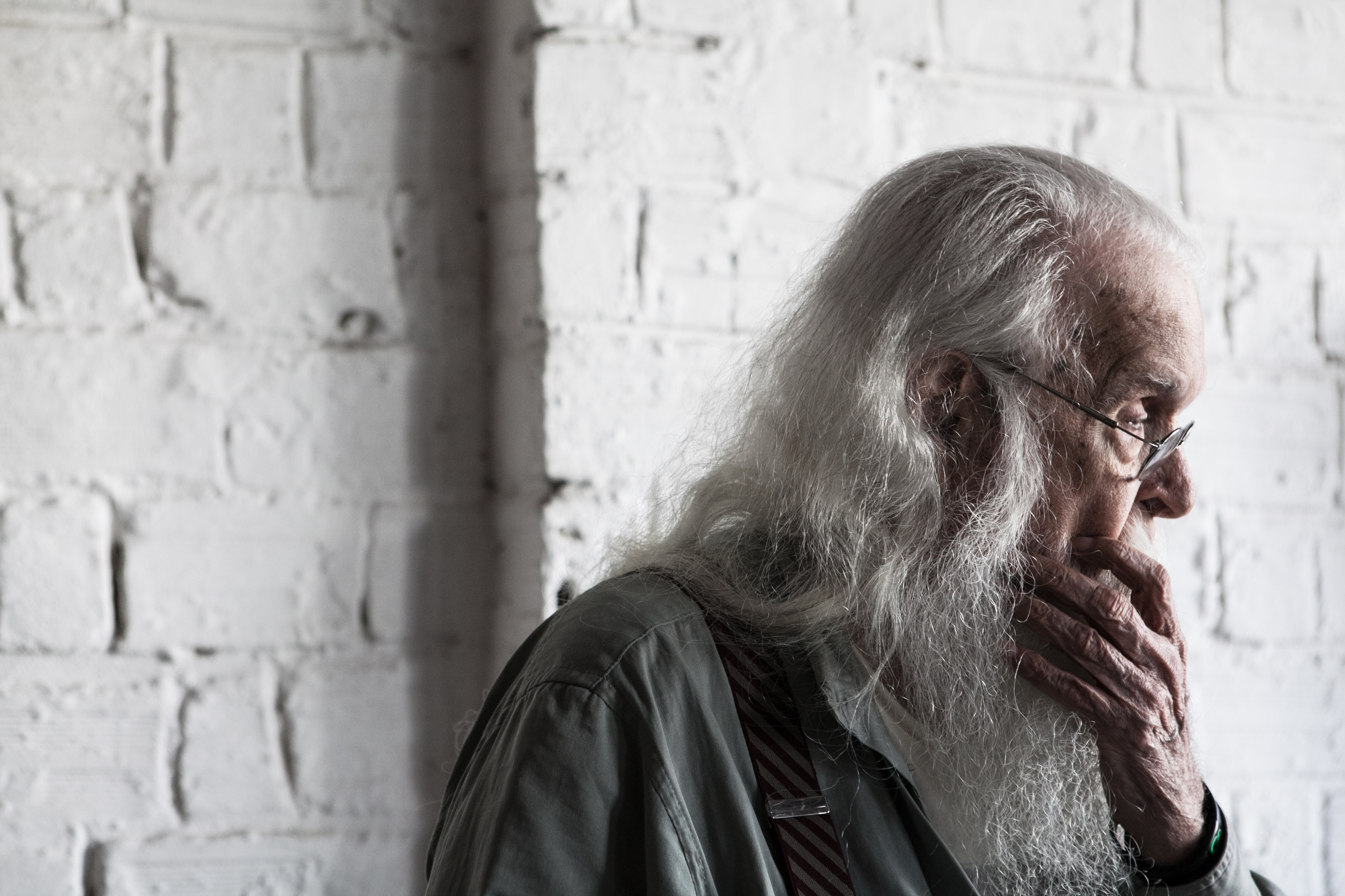 17-06-2016 Ministro da Cultura, Marcelo Calero, visita a Oficina Brennand acompanhado pelo artista Francisco Brennand, em Recife. Fotos: Janine Moraes/MinC